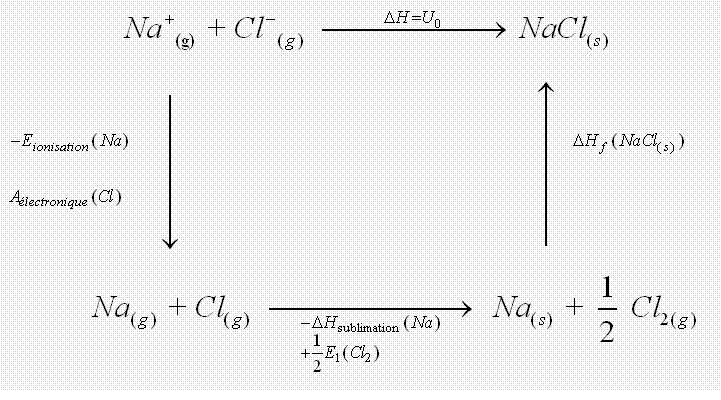 cycle de born haber appliqué à NaCl